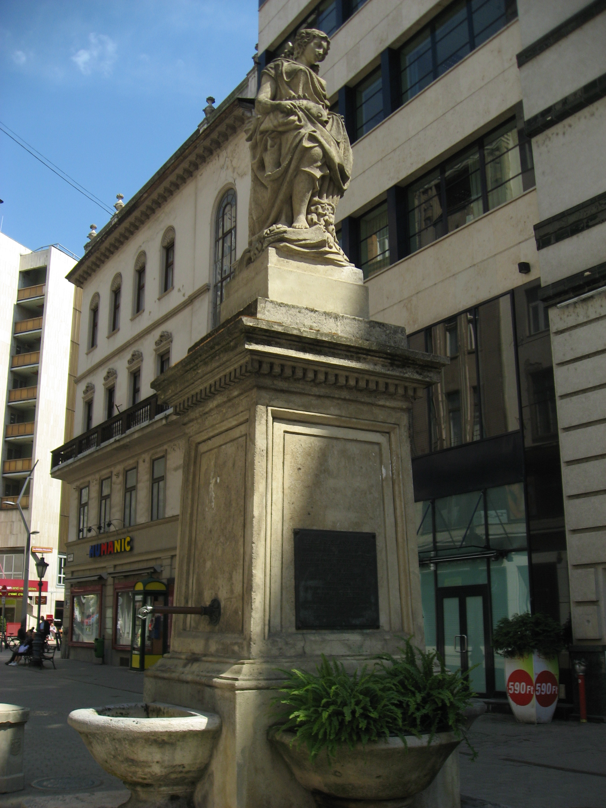 Budapešť